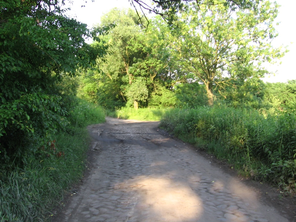 Wrocław, Poland - former village Biskupice Widawskie (Groß Bischwitz), destroyed during World War II